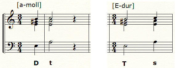 трактовка каданса как автентического или плагального зависит от его ритмического оформления